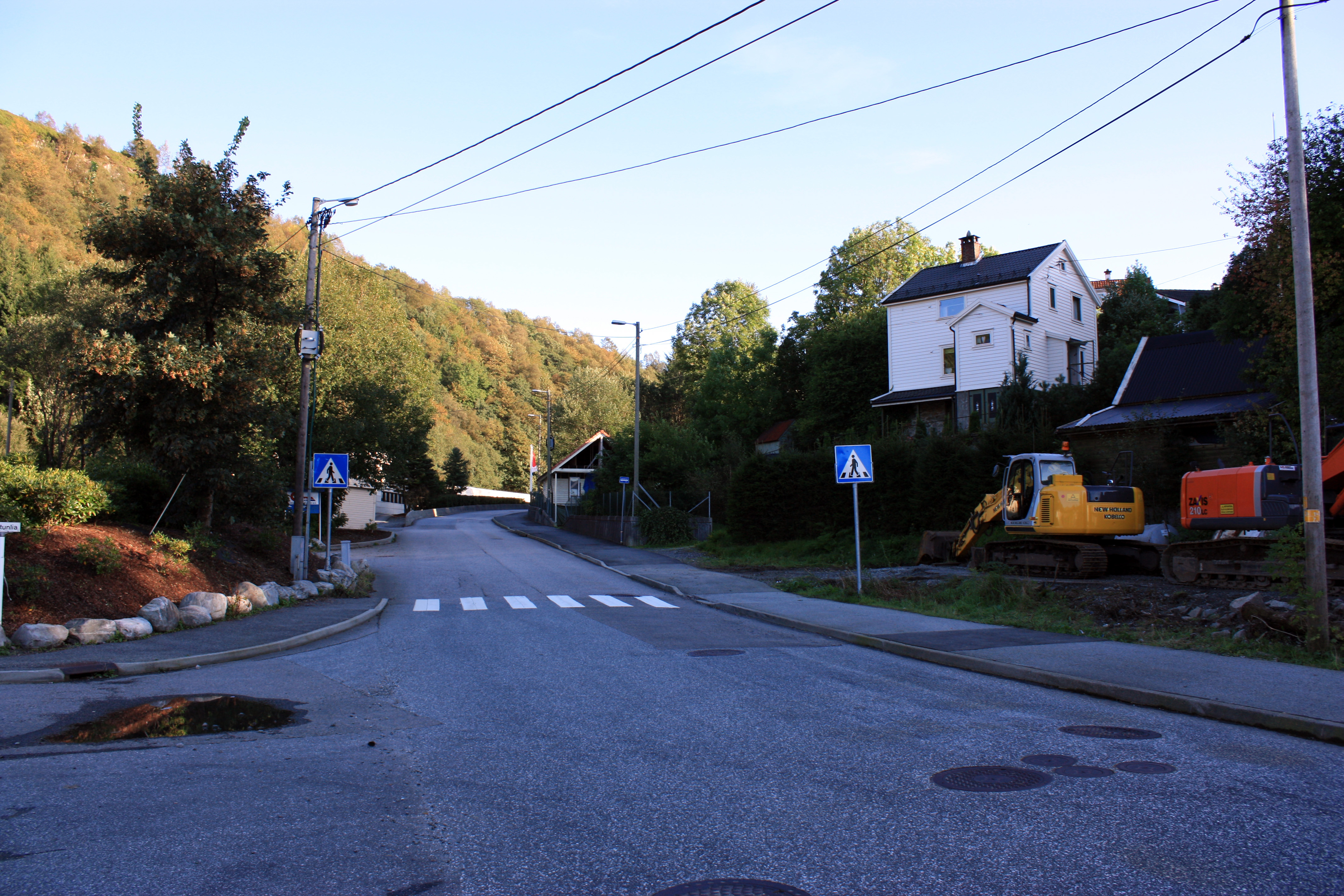 Ulsmågvegen, Fana, Bergen.